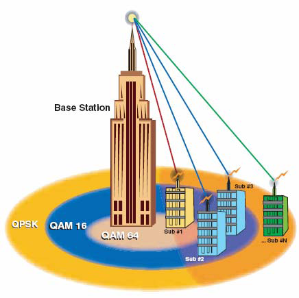 Méthode d’application AMC